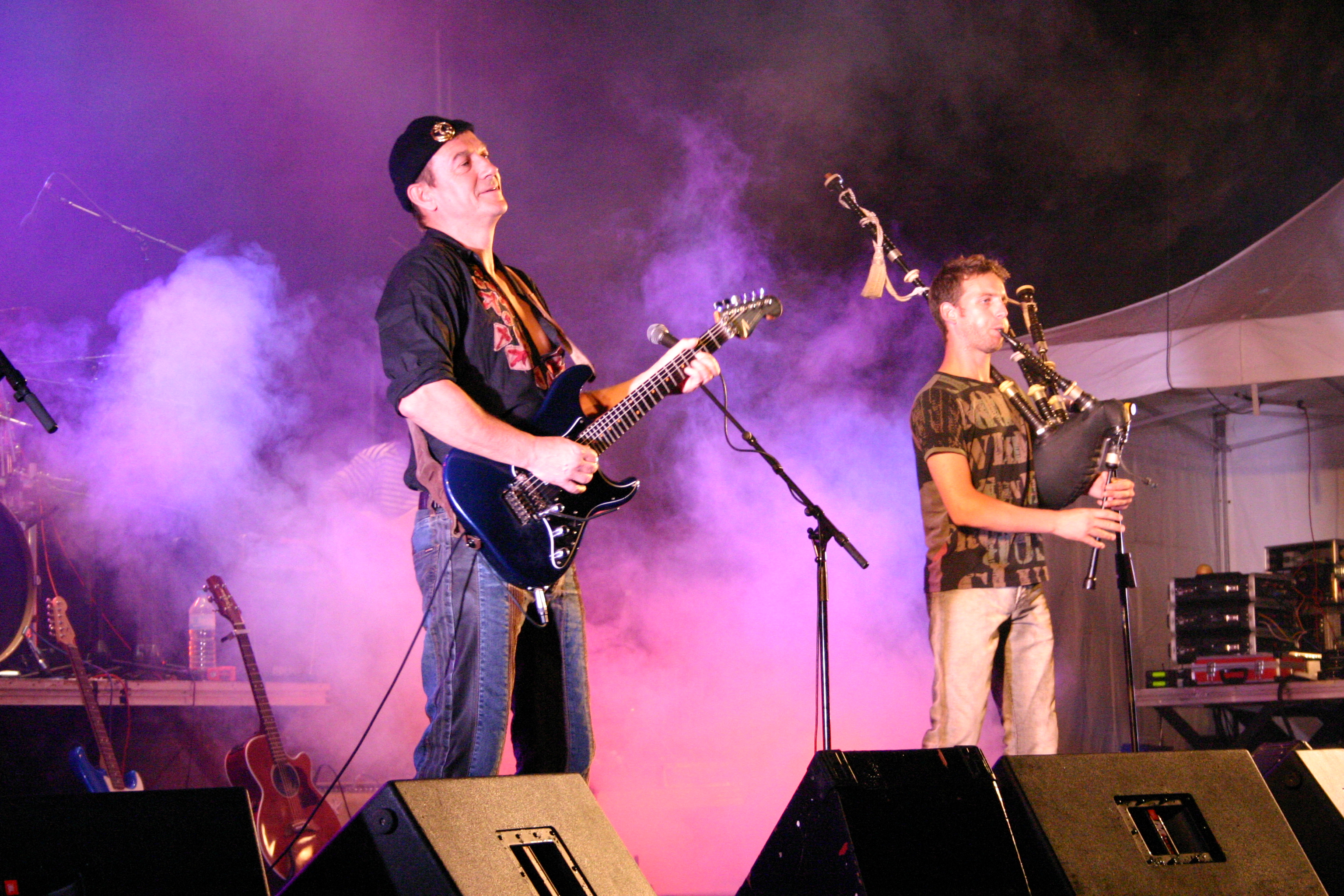 Serge Danet alias Soldat Louis avec le sonneur du groupe lors de l'Aymon Folk Festival de Bogny-sur-Meuse en 2004.